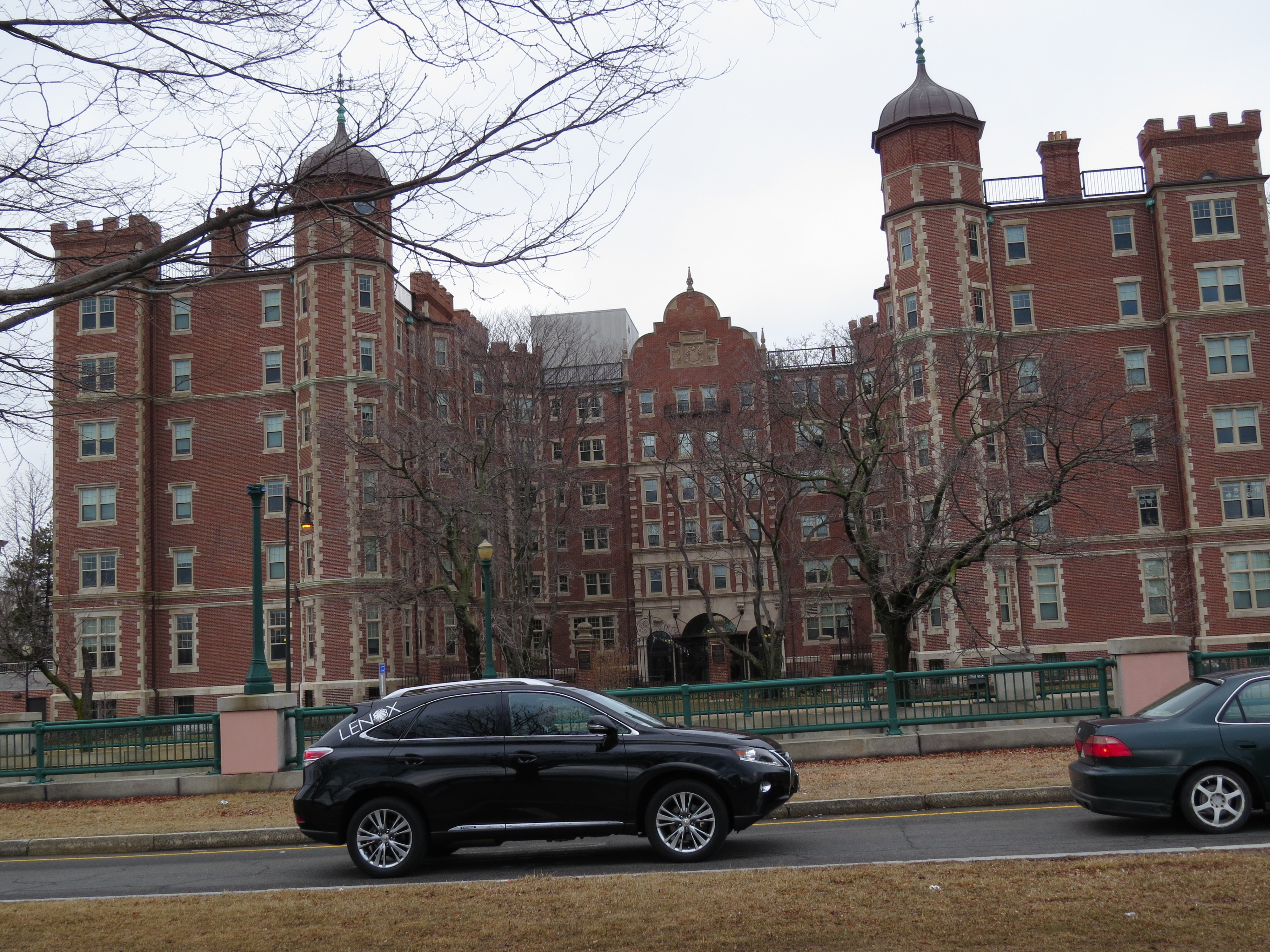 Возле МIT